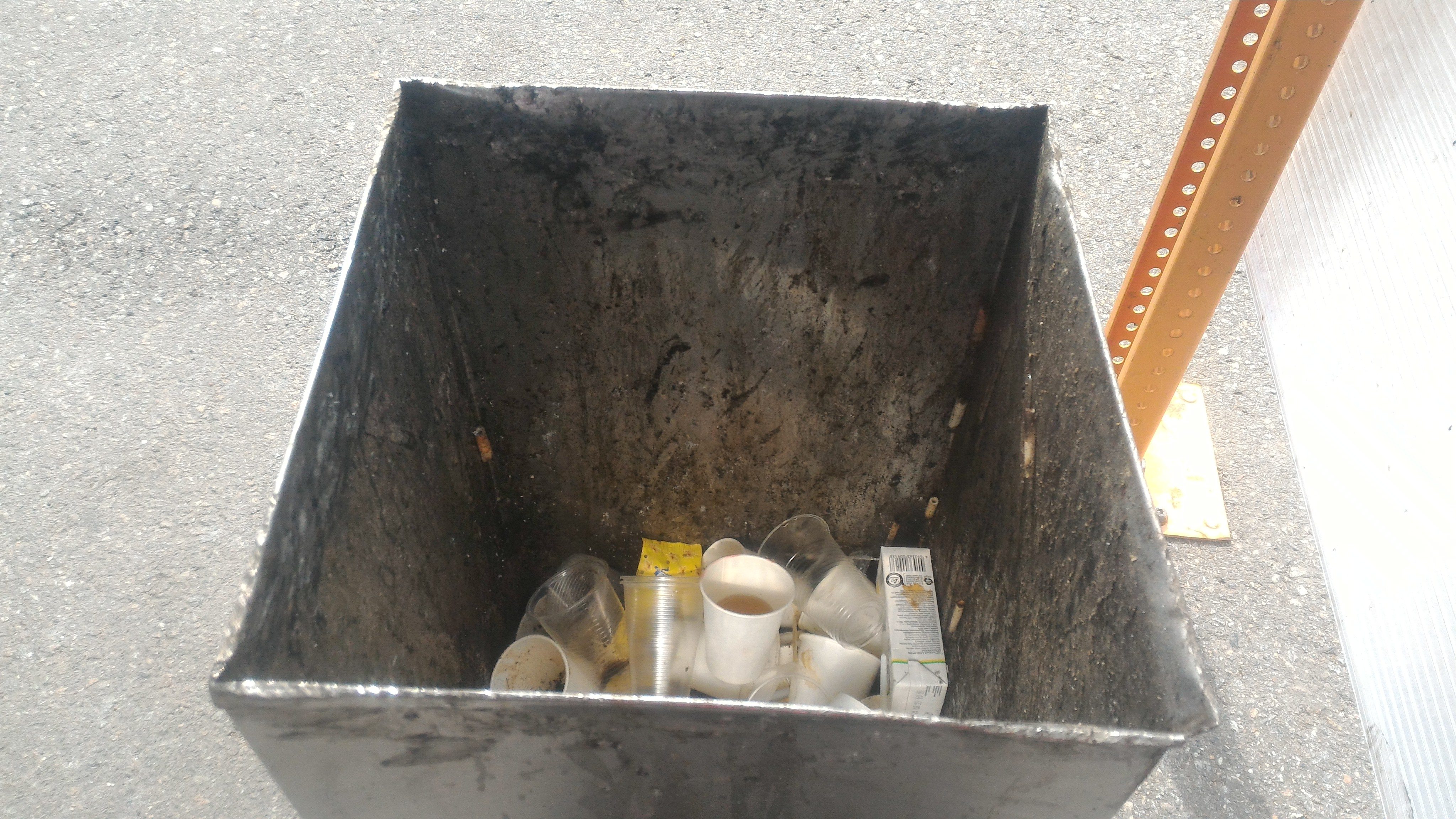 Мусорный бак возле торгового центра "Радуга" Санкт-Петербург